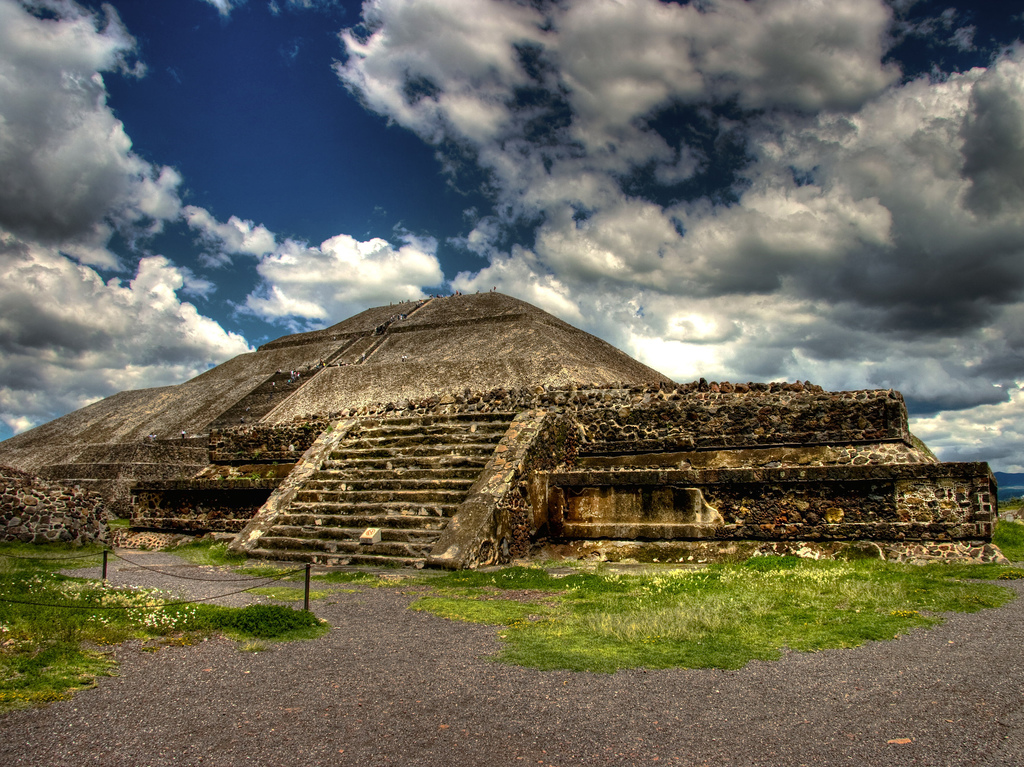 Piramide del sole di teotihuacan in HDR